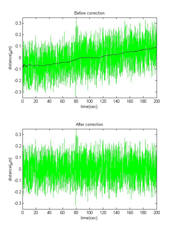 תיקון הסחיפה בניסוי "תנועת חלקיק קשור"